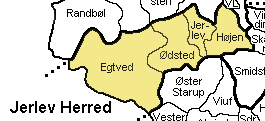 Jerlev Herred, Vejle Amt, Denmark Map by Svend-Erik Christiansen , edited by Nico-dk.